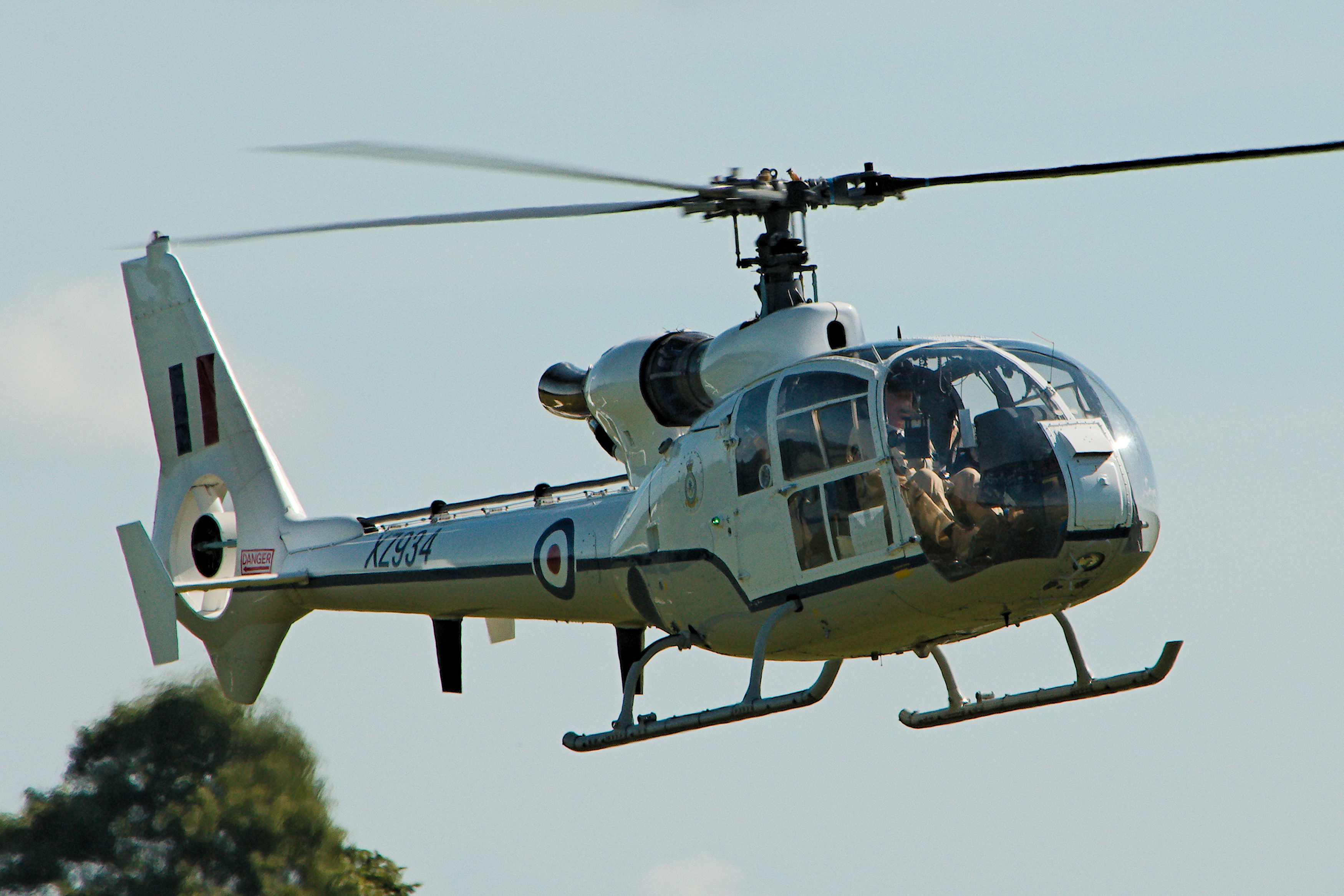 Gazelle - Fly Navy 2017